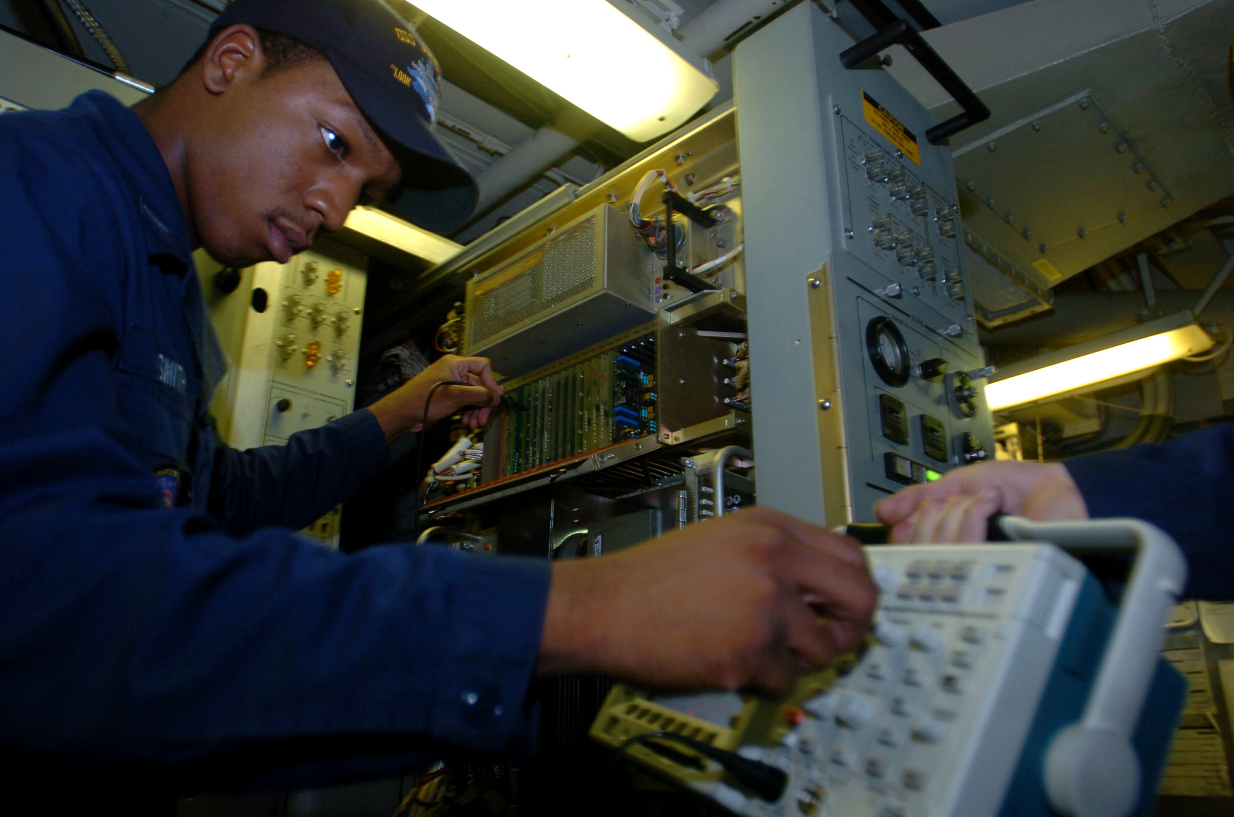 SPS-49 maintenance